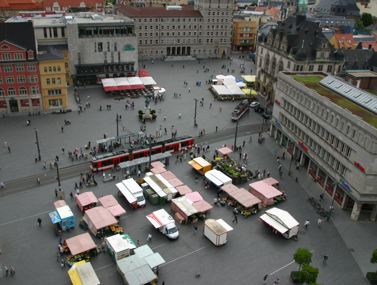 Halle (Saale), Blick von den Hausmannstürmen der Marktkirche Unser Lieben Frauen.